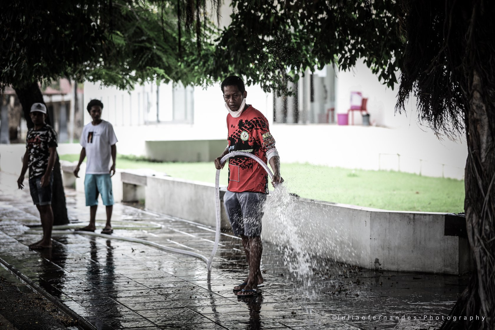 Präventionsmaßnahmen am Präsidentenpalast Osttimors